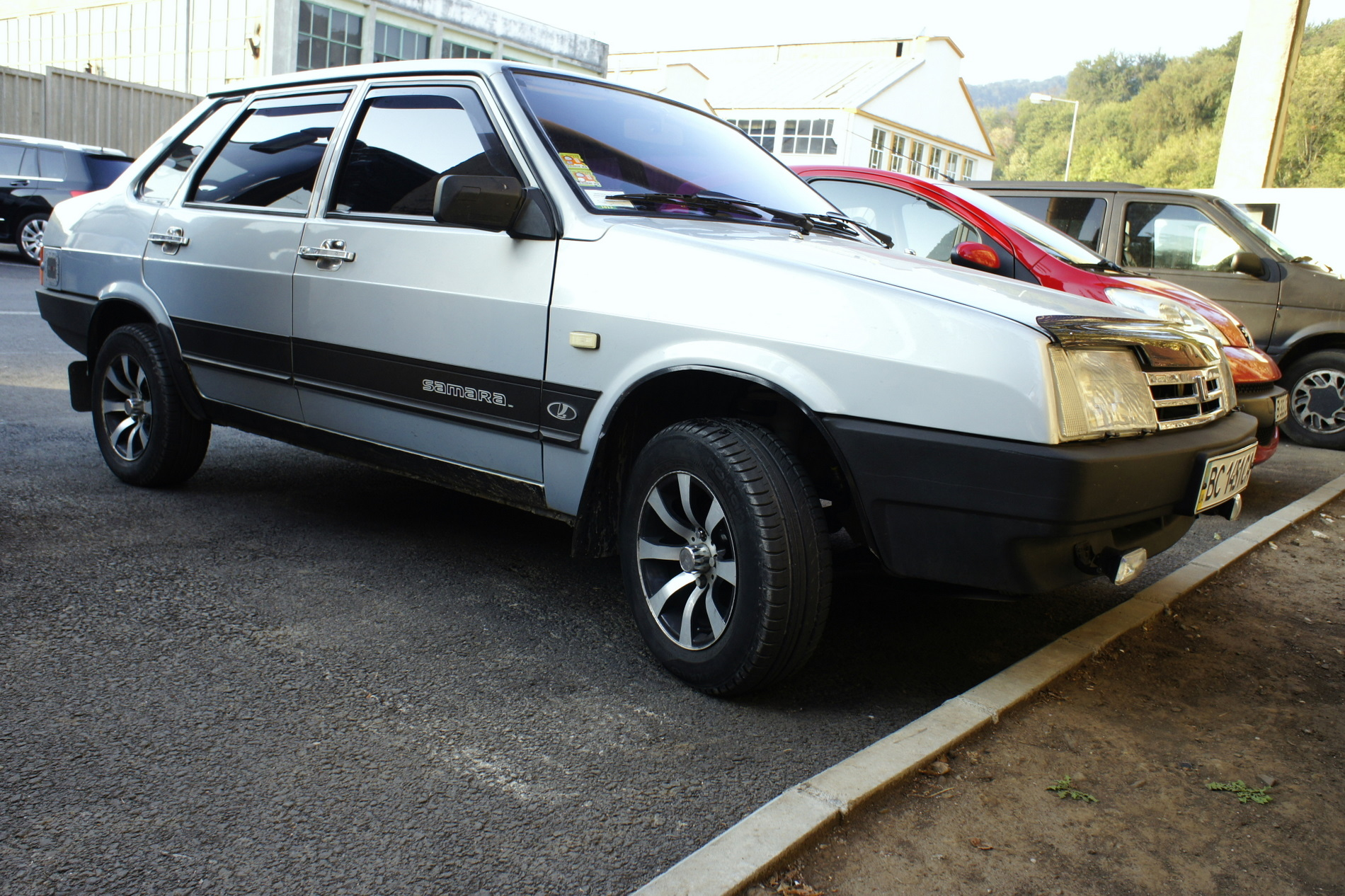 Lada Samara Sedan 1500 (VAZ 21099)